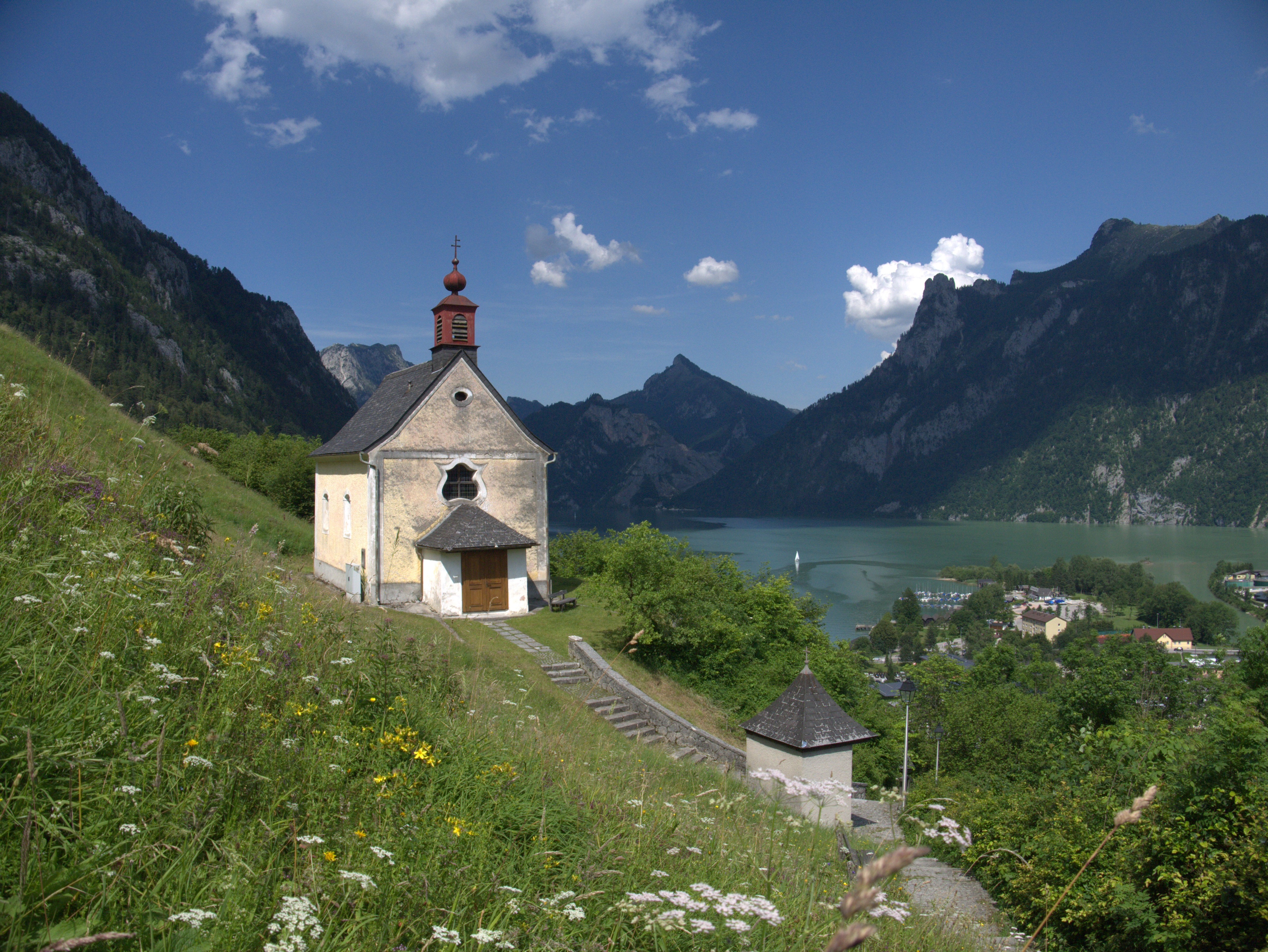 Kalvarienbergkapelle